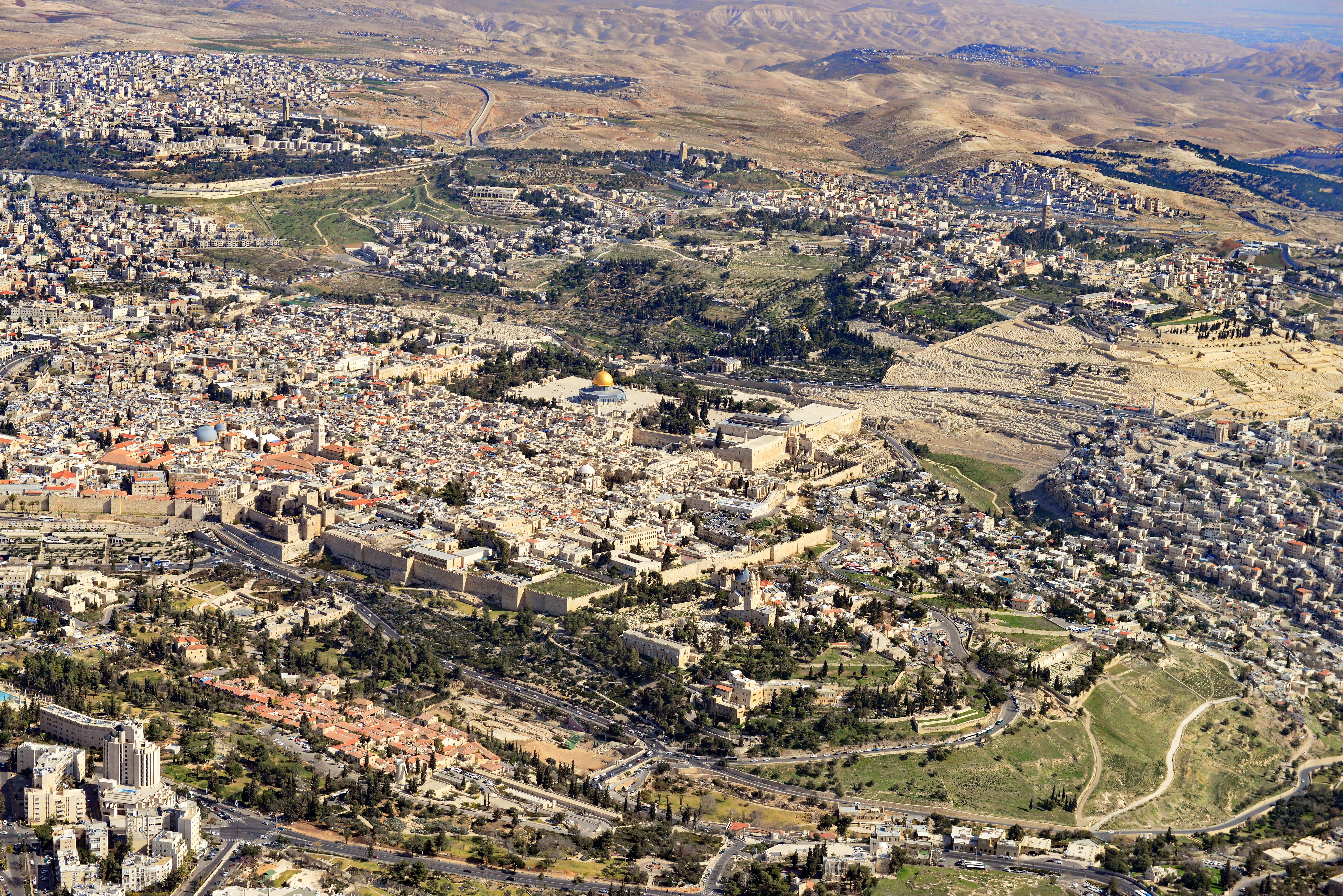 المسجد الأقصى ويظهر أيضاً البلدة القديمة في القدس وجبل الزيتون، وسلوان، وراس العامود، والعيسوية، والزعيم، والخان الأحمر، ومستوطنة كيدار، وأريحا - التي في الأفق-، واجزاء من جدار الفصل العنصري